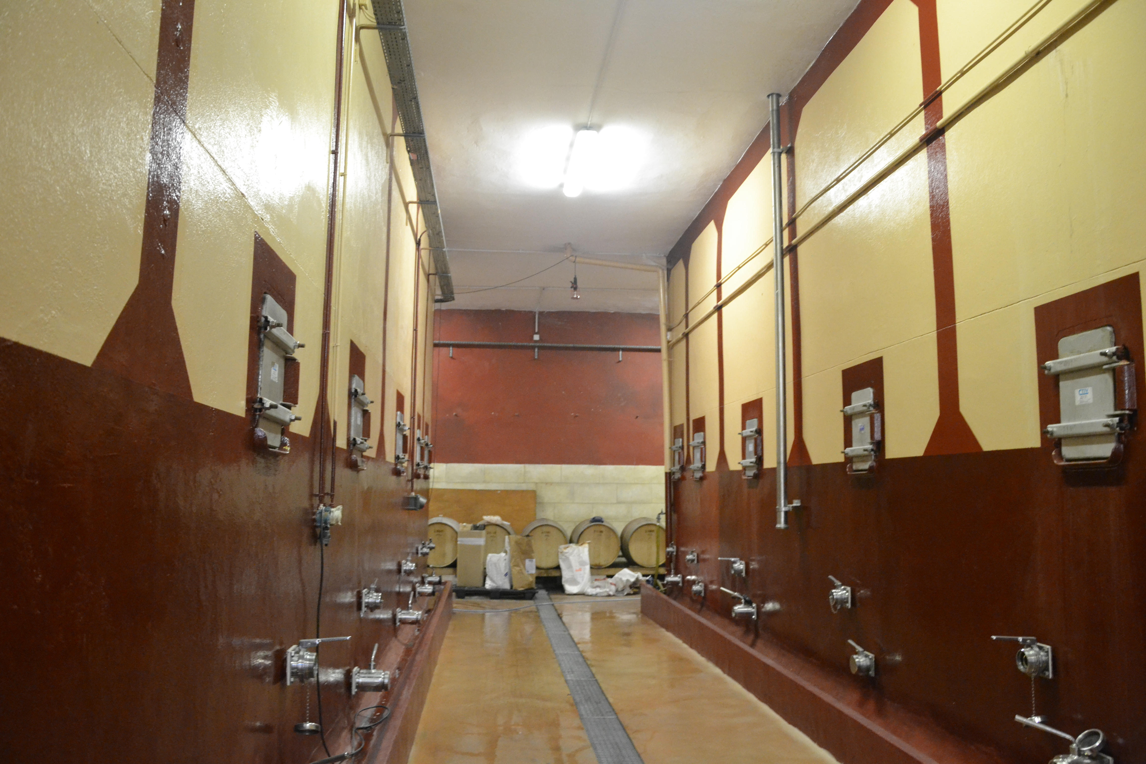 Cave coopérative viticole de Morières-lès-Avignon : cuves béton